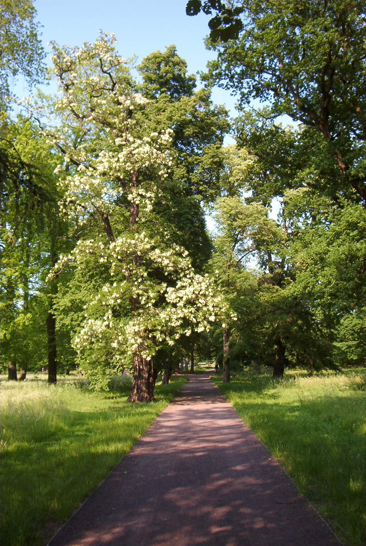 Herrenkrugpark Magdeburg, selbst aufgenommen am 29.5.2005, erteilte Lizenz: GNU-FDL